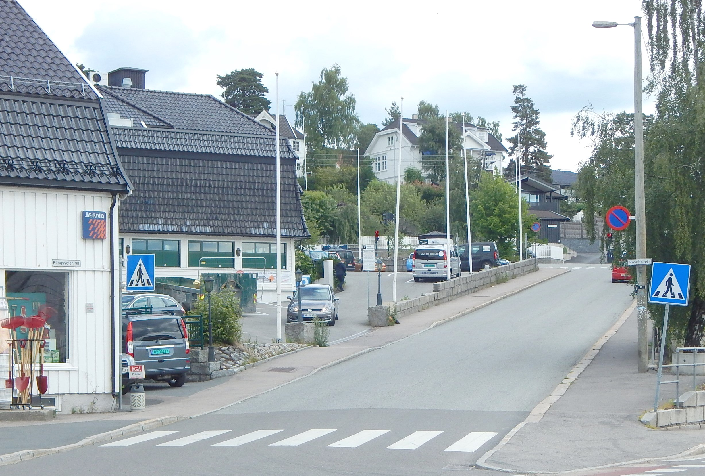 Raschs vei sett fra Kongsveien